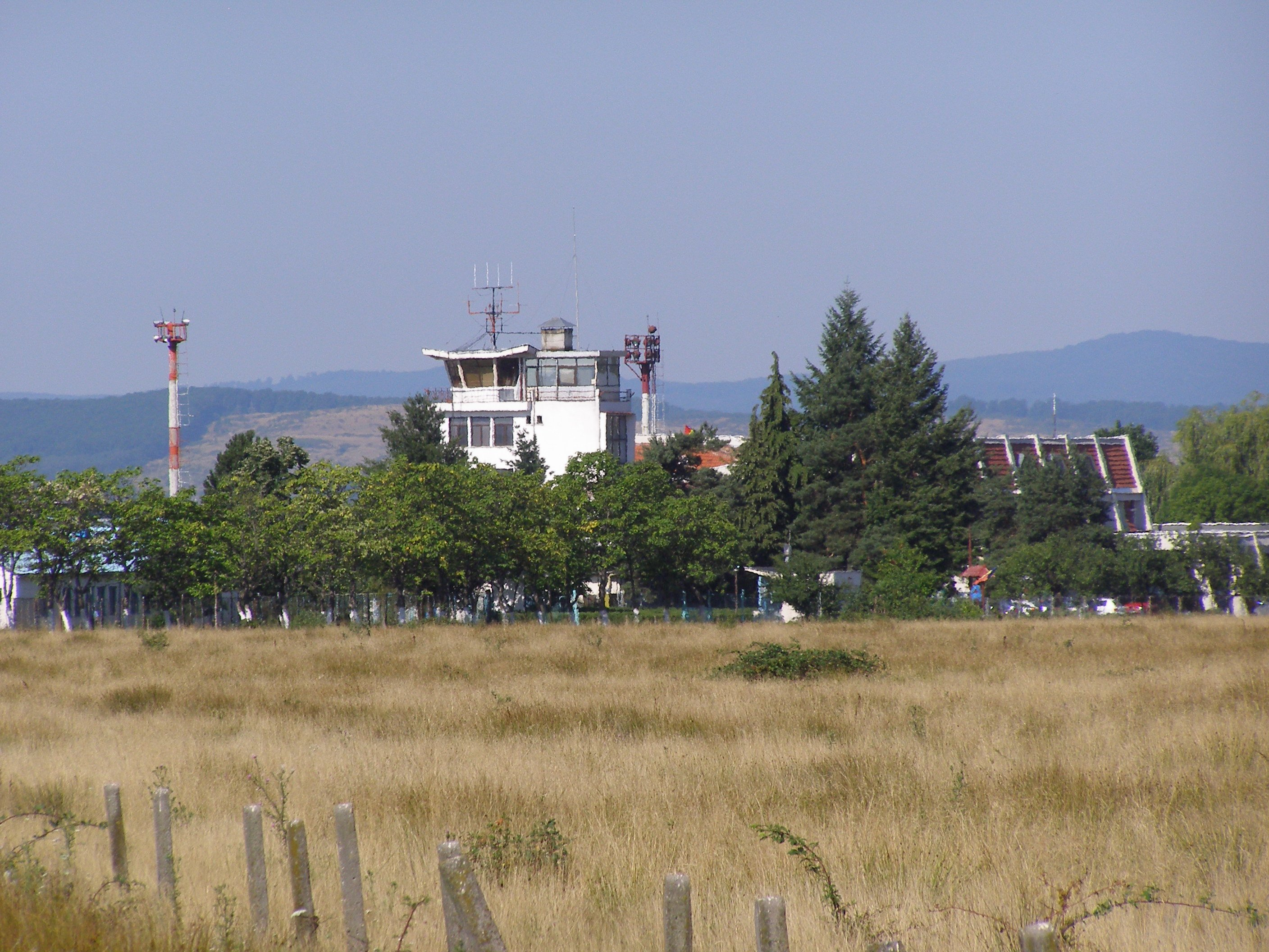 Baia Mare airport in Tăuţii-Măgherăuş